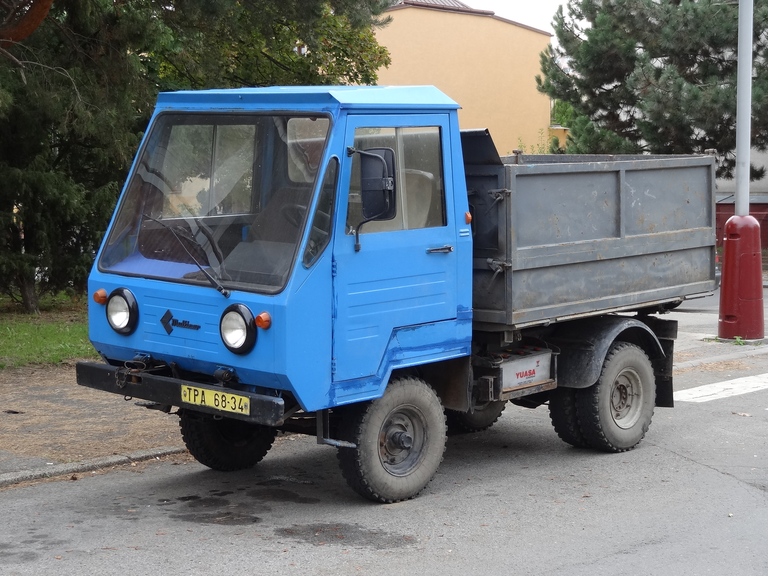 M 25 (IFA)